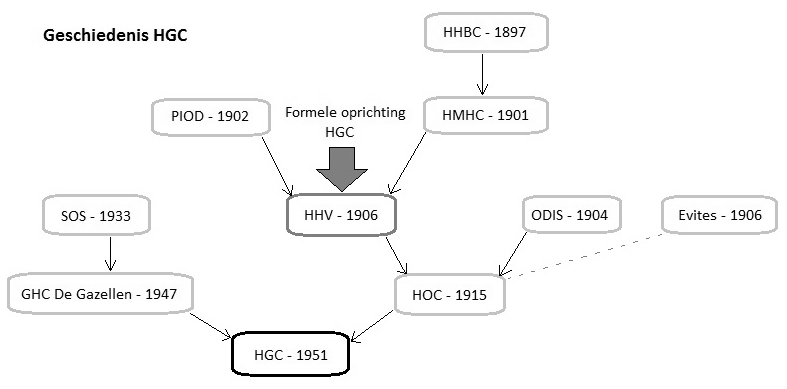 Flowchart die laat zien hoe hockeyclub HGC in het verleden werd gevormd.